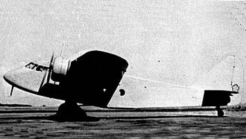 一式輸送機は、日本陸軍の輸送機。試作名称はキ59。開発・製造は日本国際航空工業。